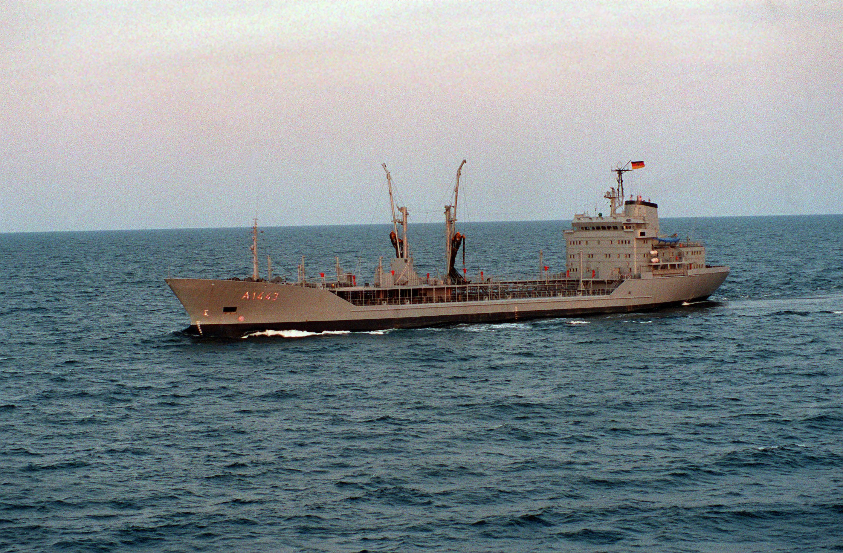 The German replenishment oiler Rhön (A 1443) underway during exercise BALTOPS '93.